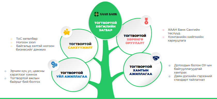 Монгол: ХААН Банк Тогтвортой хөгжлийн загварыг дараах байдлаар тодорхойлон ажиллаж байна.